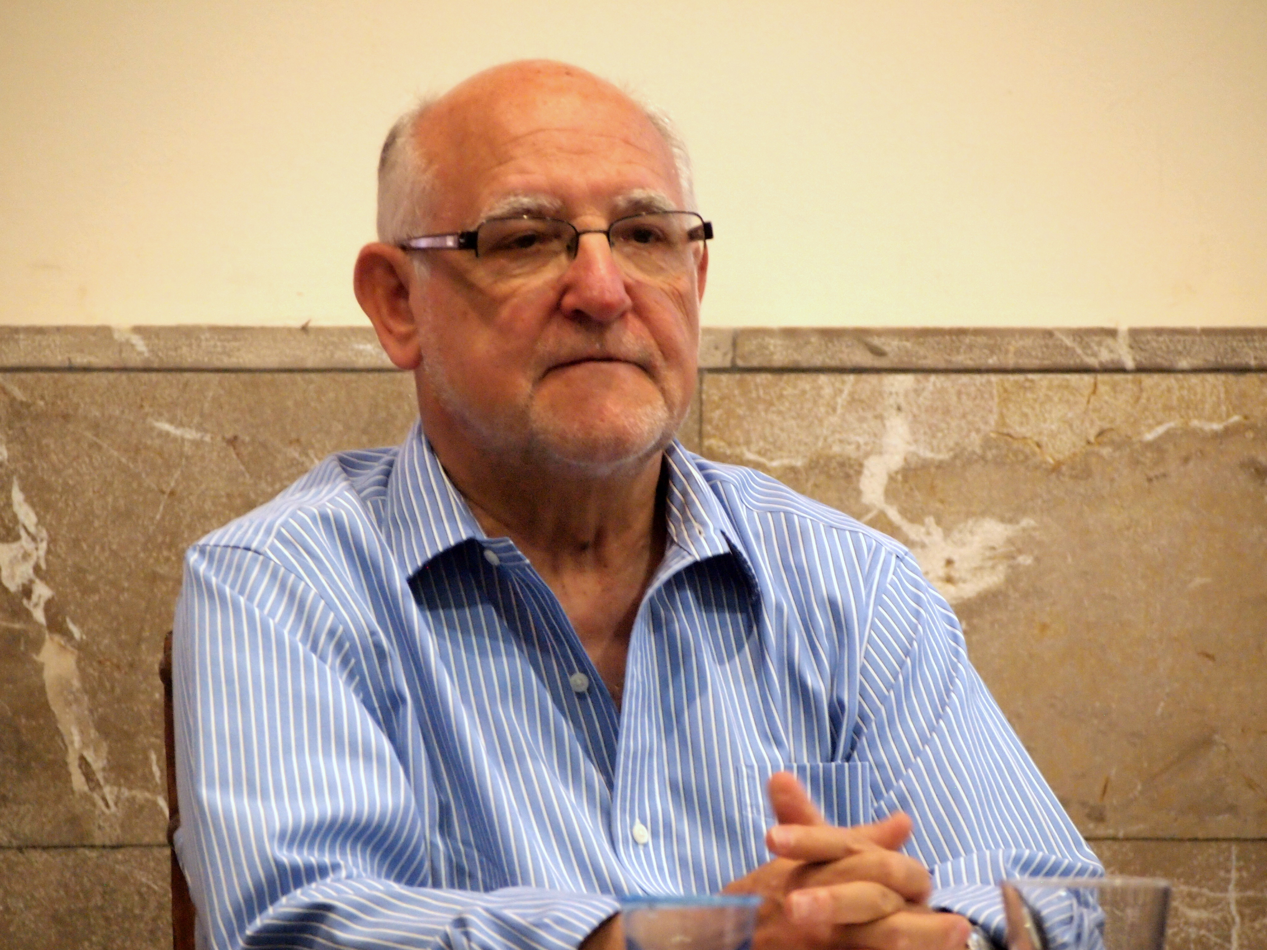 Jaume Oliver Jaume (Llucmajor, Mallorca, 1942) és un destacat pedagog mallorquí.